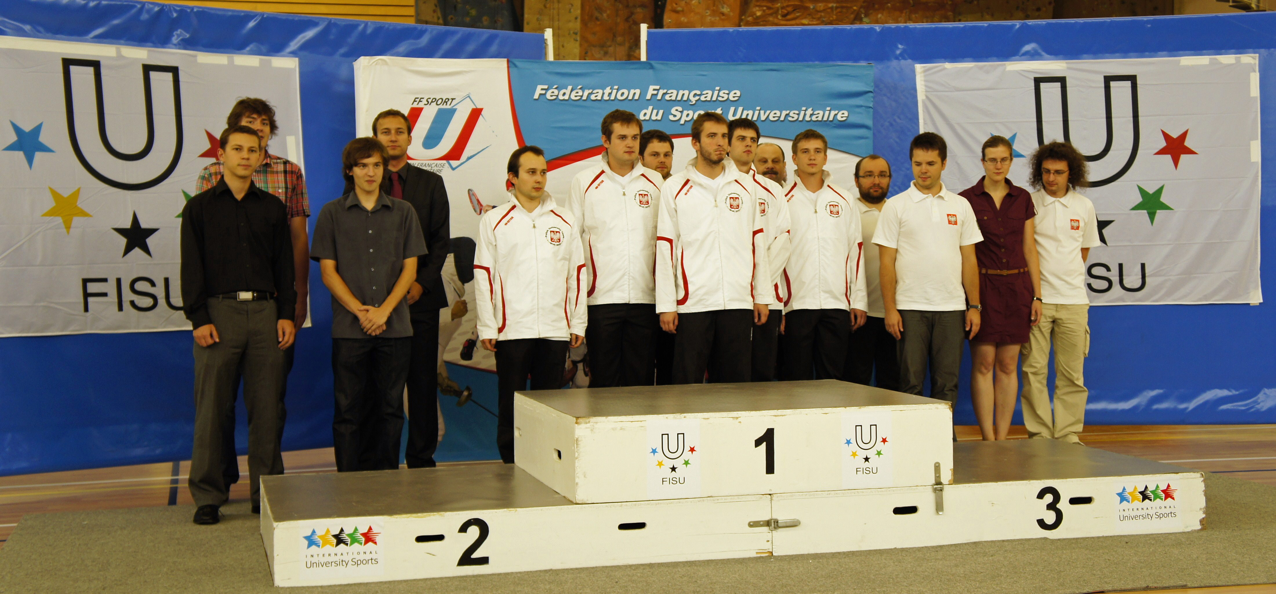 Podium du 6e championnat du monde universitaire de bridge.